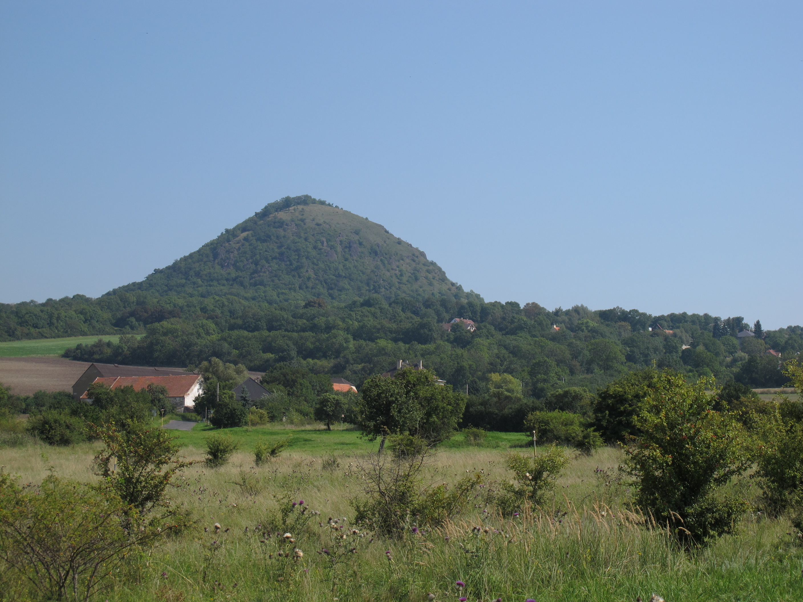 Kopec Milá s přírodní rezervací, v popředí osada Milá